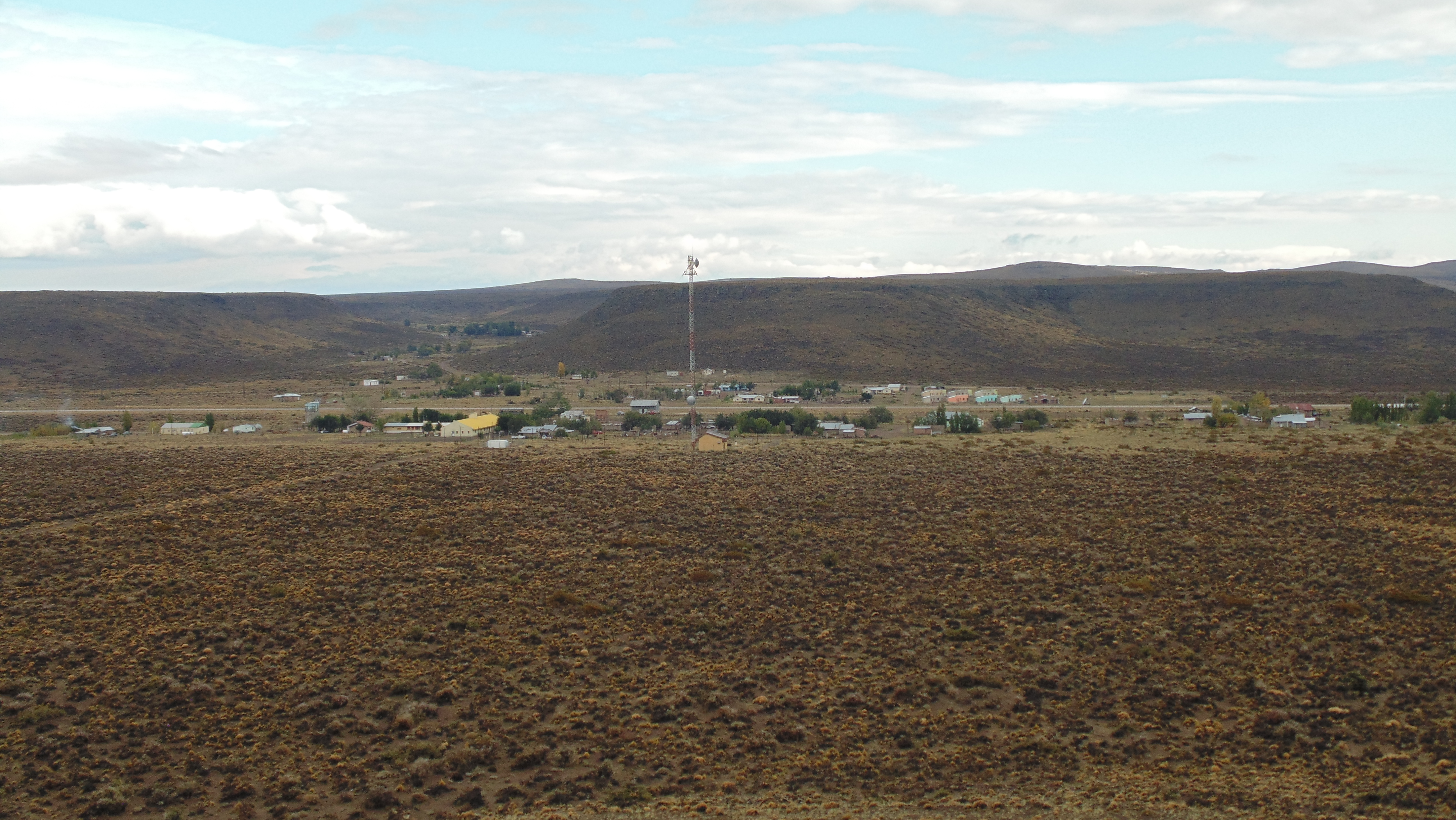 Imagen tomada en abril de 2016.